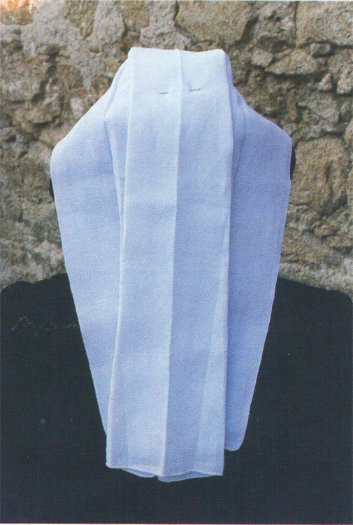 U rituartu